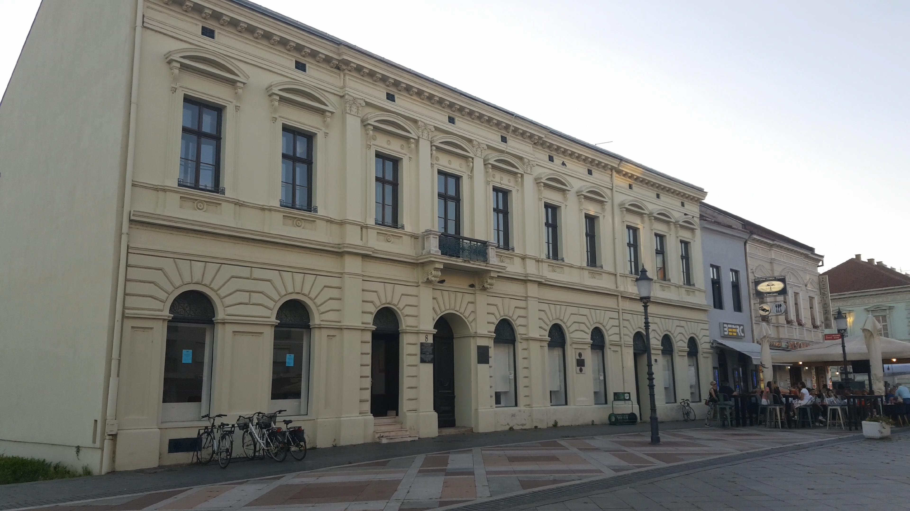 Palača obitelji Brlić